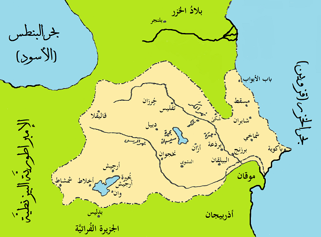 خريطة أرمينية بِحُدودها التقريبيَّة قُبيل فتحها على يد المُسلمين.